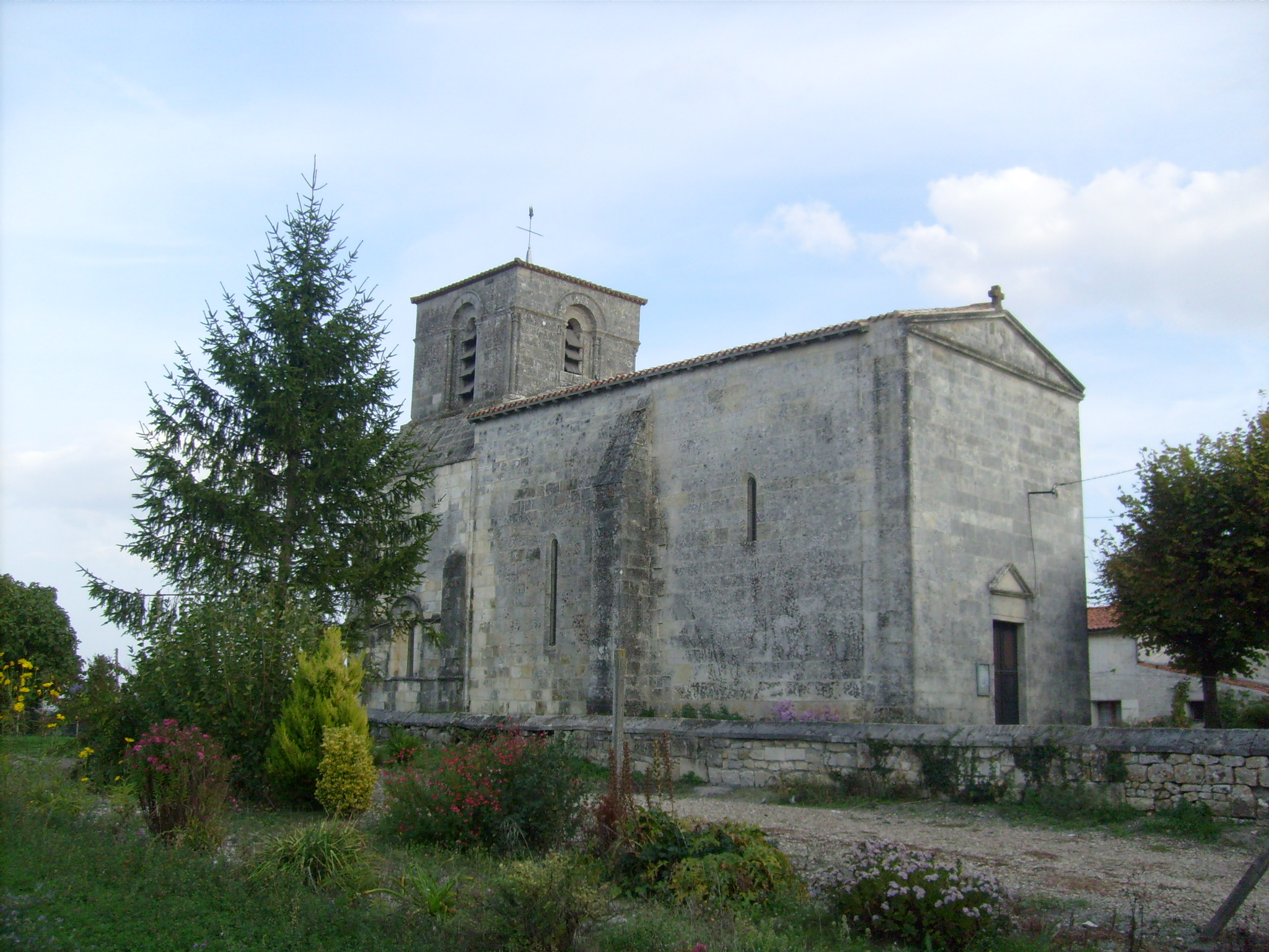 Eglise de La Jard